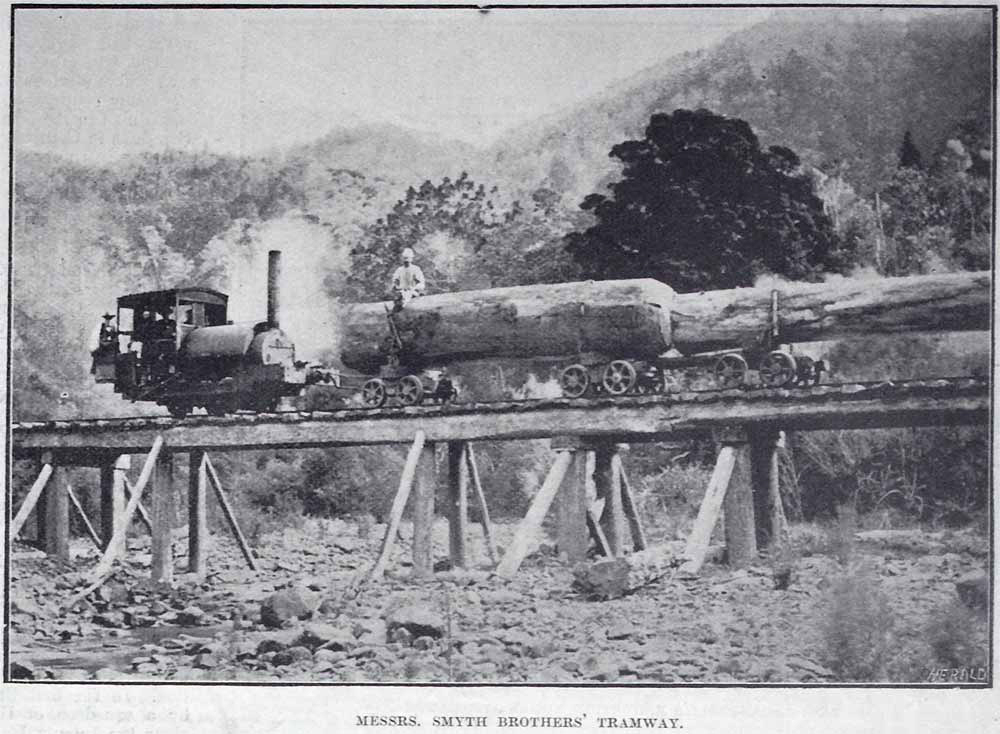 Messrs. Smyth Brothers' Tramway